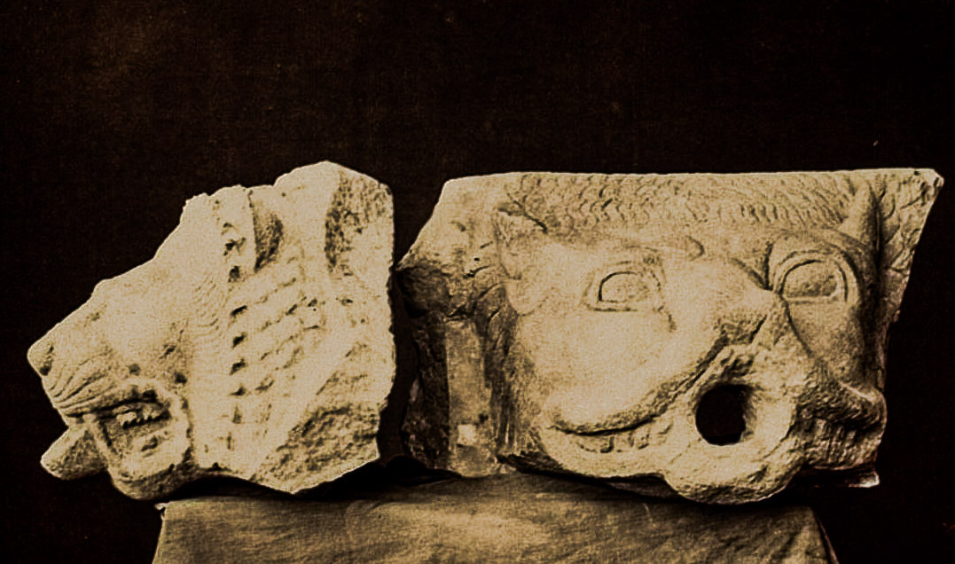 Zwei Löwenköpfe mit Sima vom Zeus-Tempel in Olympia; der erste gefunden am 31. Januar 1876 vor der Südwestecke. H. 0,46 M.; der andere gefunden am 10. Februar 1876 vor der Nordwestecke. H. 0,45 M.